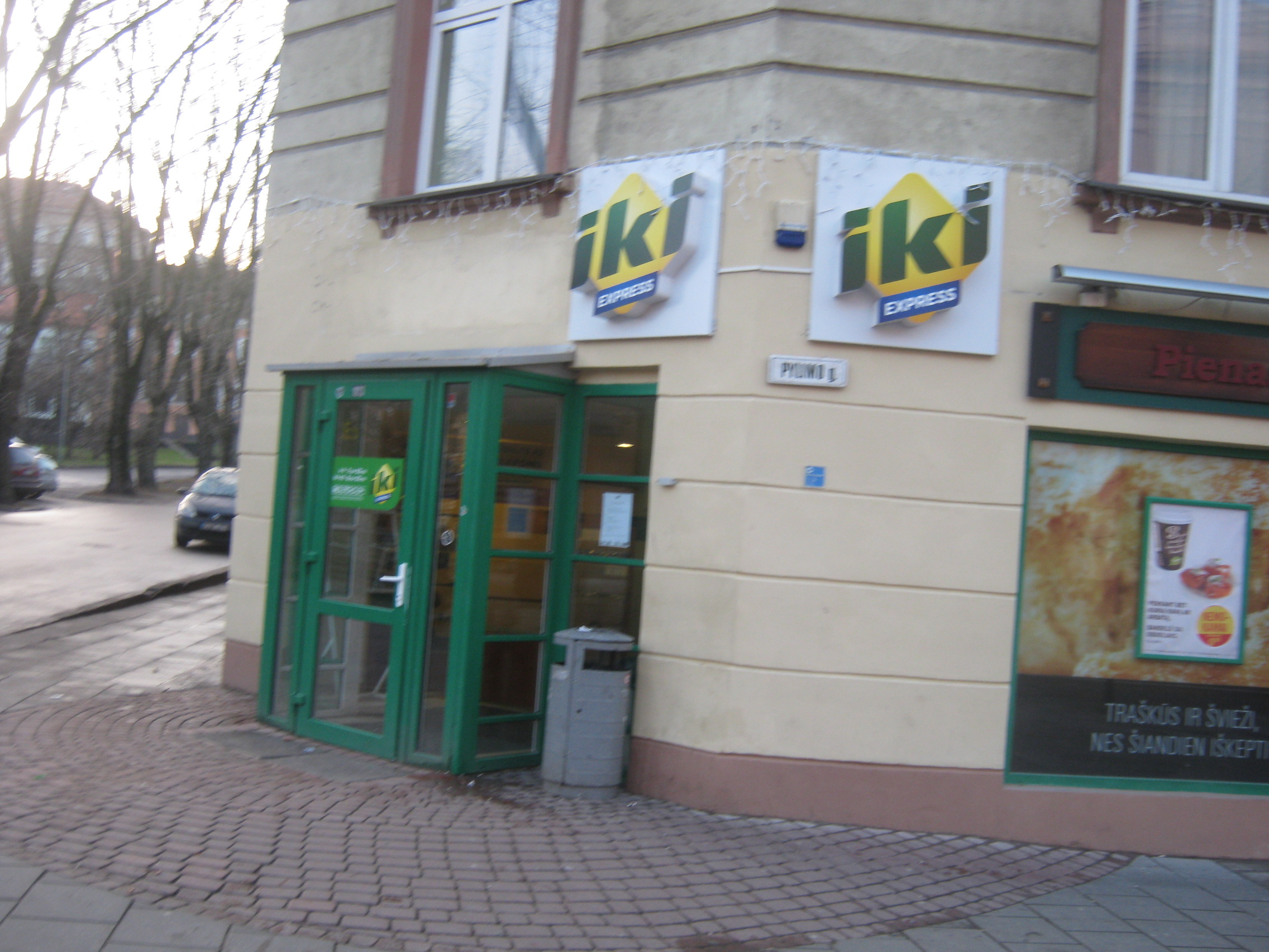 IKI Express